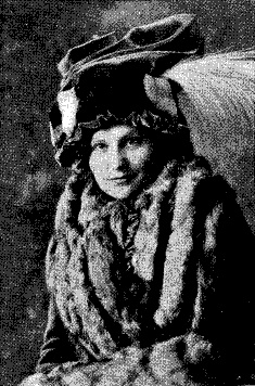 Porträtt av Olga Nordenskiöld, klädd i hatt och päls. Bilden finns publicerad i nr 450 av Hvar 8 Dag, 1913. En annan bild tagen vid samma tillfälle finns publicerad i Lindberg, Christer (1996). Erland Nordenskiöld: ett indianlif. Stockholm: Natur och kultur.